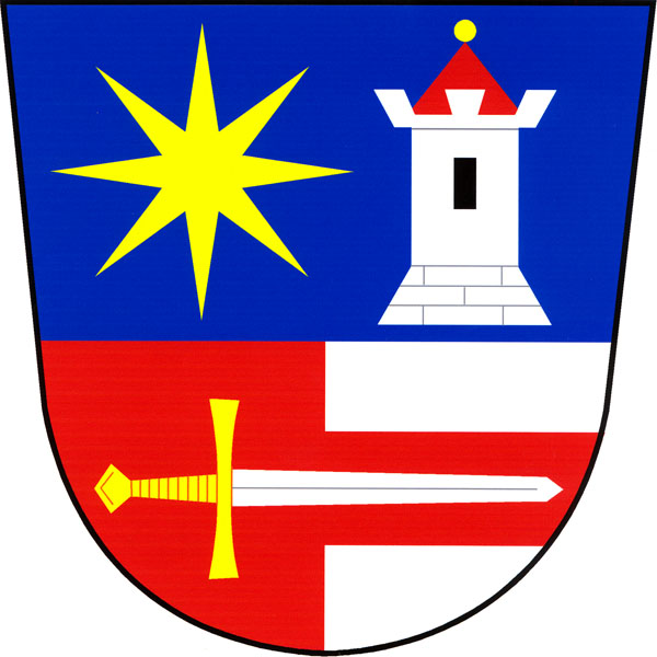 Znak obce Strašín